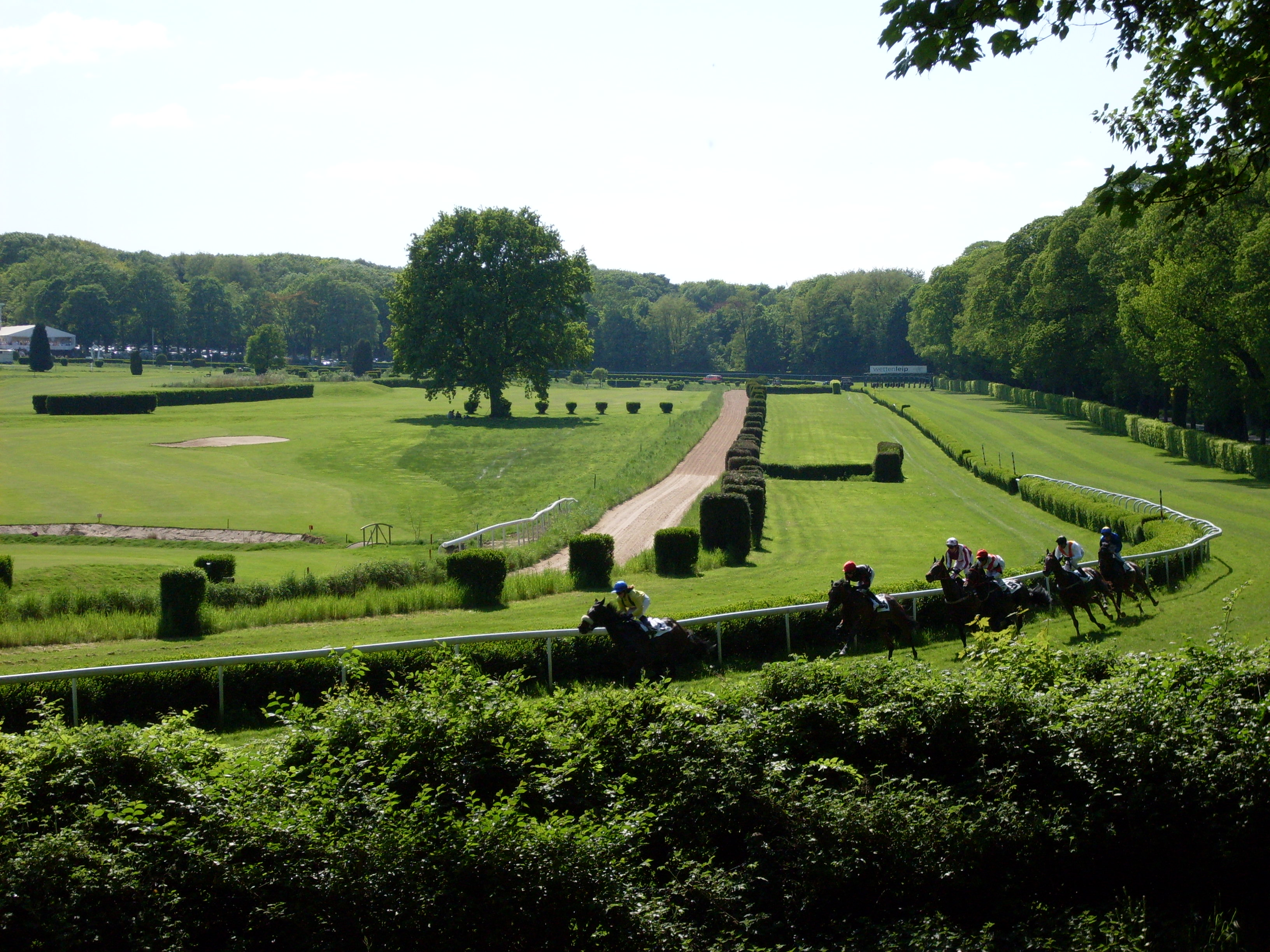 Düsseldorf Galopprennbahn, Rennen anläßlich des Henkel-Familientages